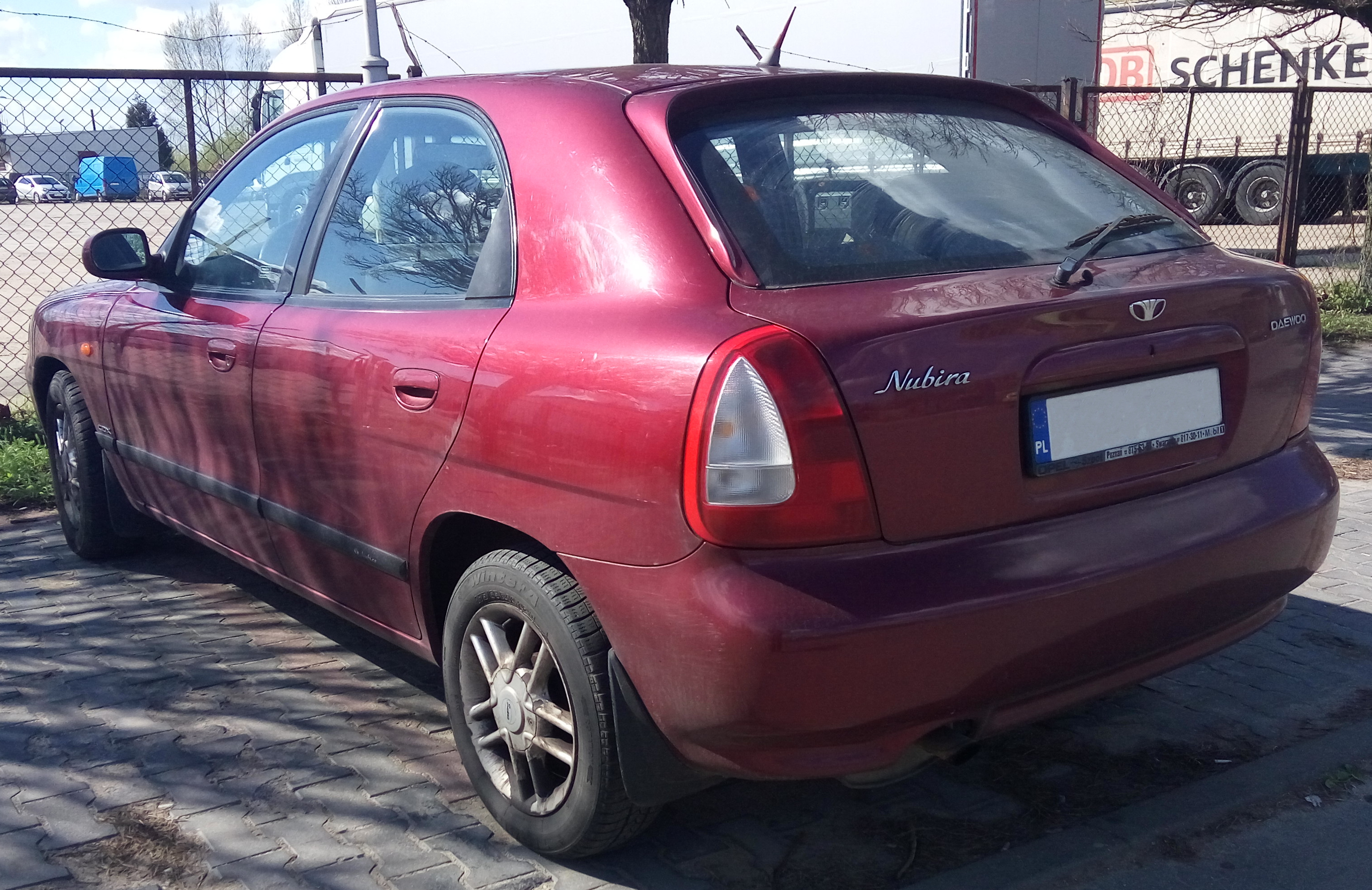 Sylwetka Daewoo Nubiry hatchback I generacji (J100)